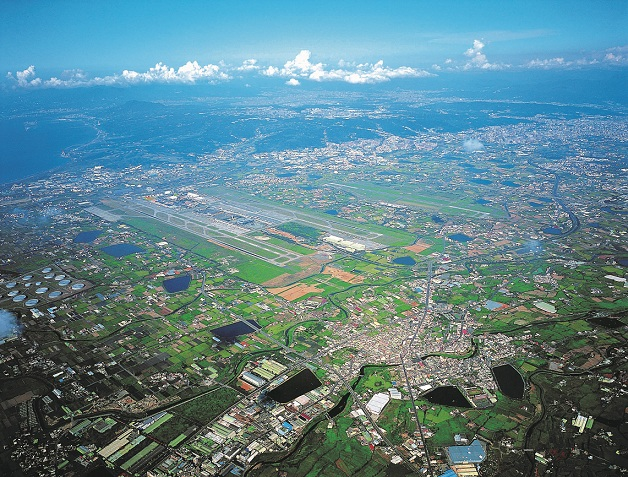 中文（台灣）: 桃園航空城空拍圖。